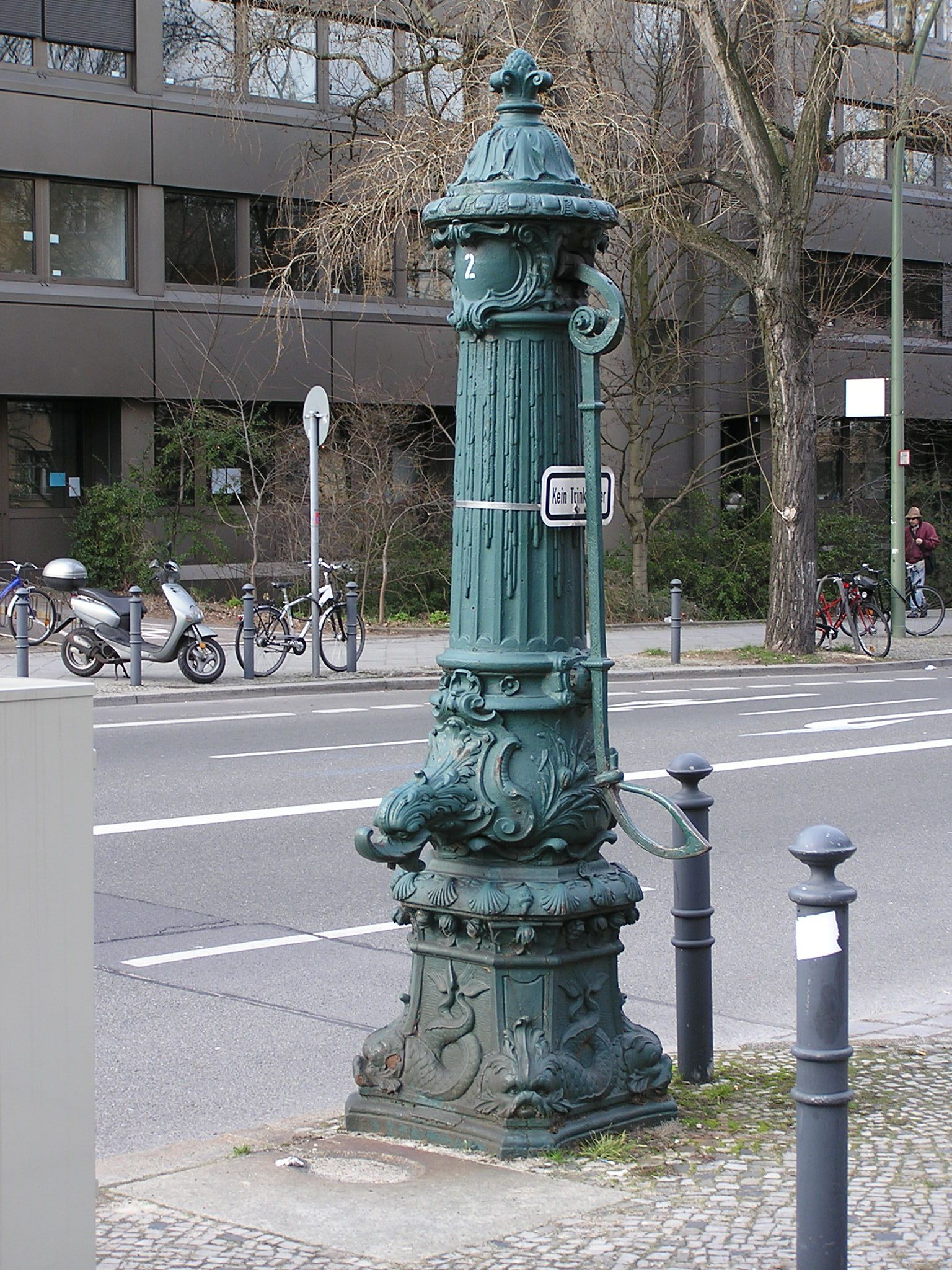 Straßenbrunnen in der Franklinstraße Nähe Salzufer in Berlin-Charlottenburg.